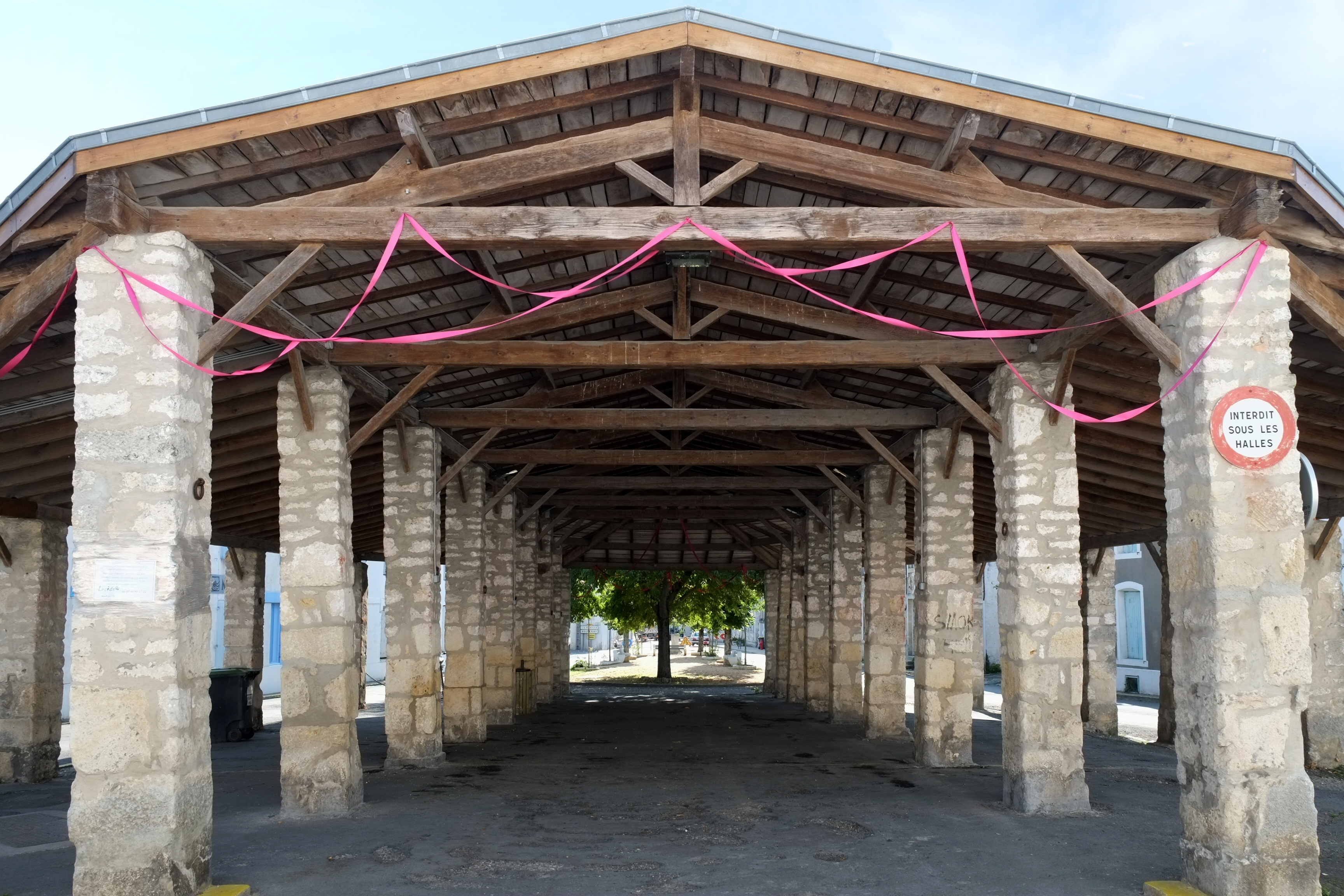 Halles Mornac-sur-Seudre Charente-Maritime France